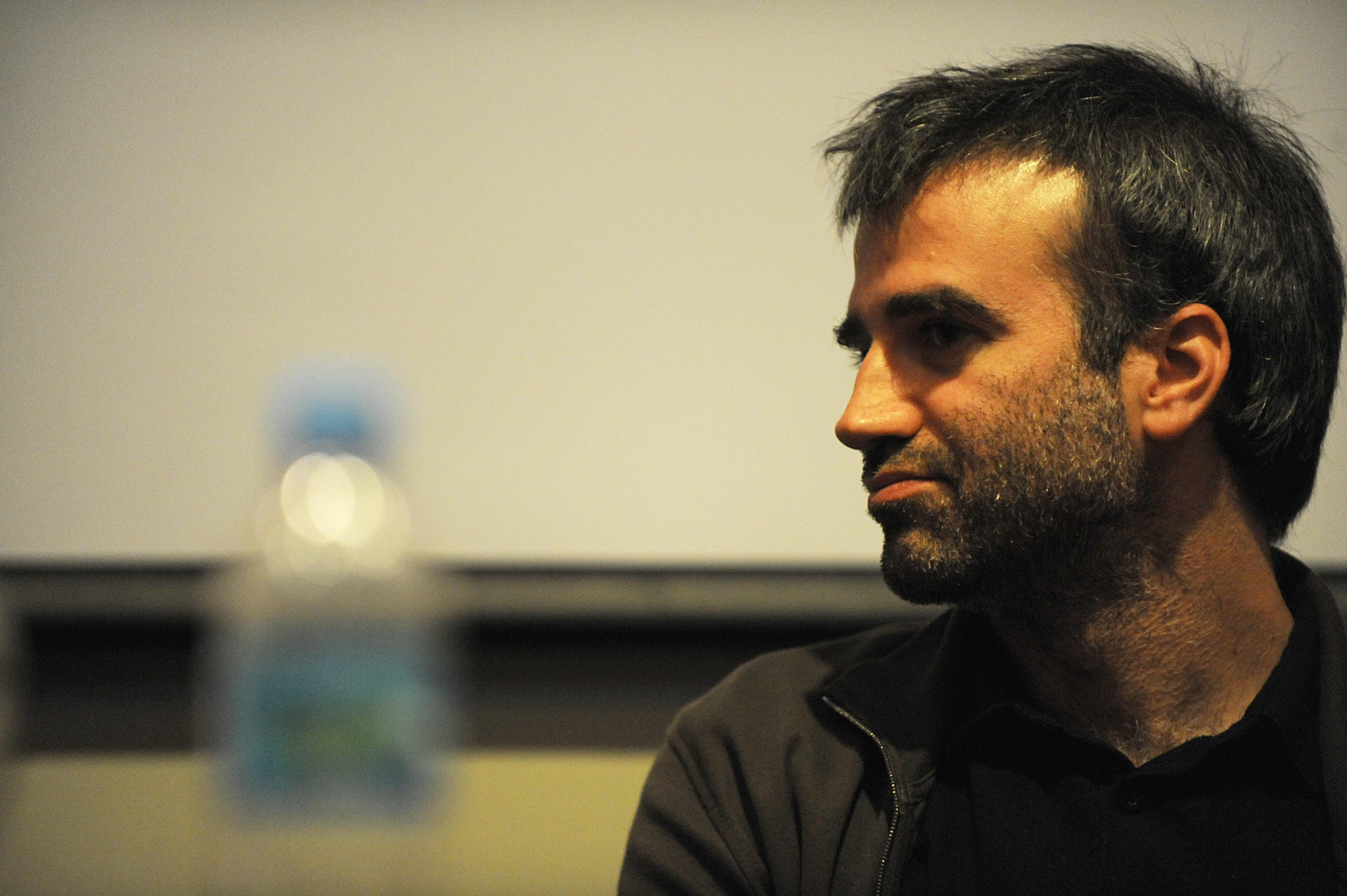 los 7 locos charla3